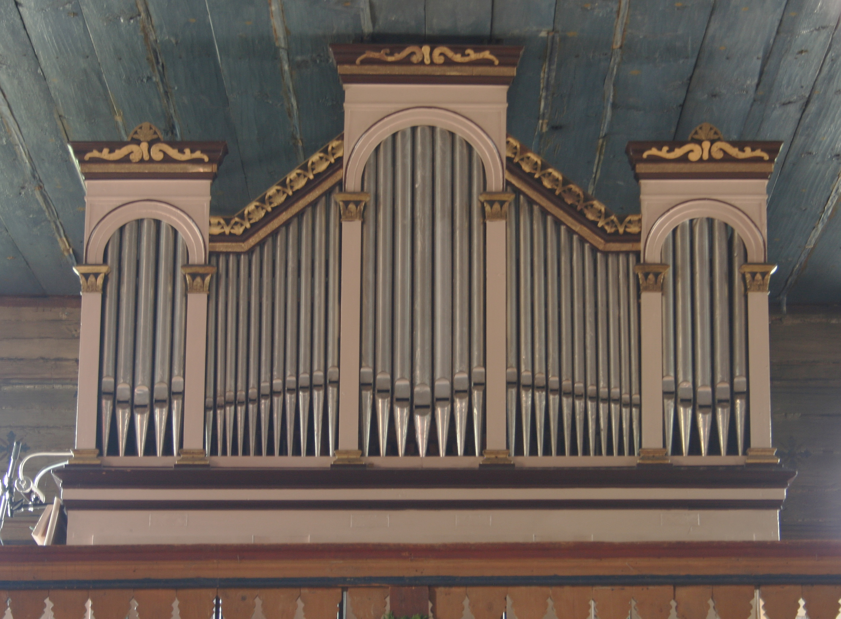 Organy w kościele św. Trójcy w Koszęcinie.